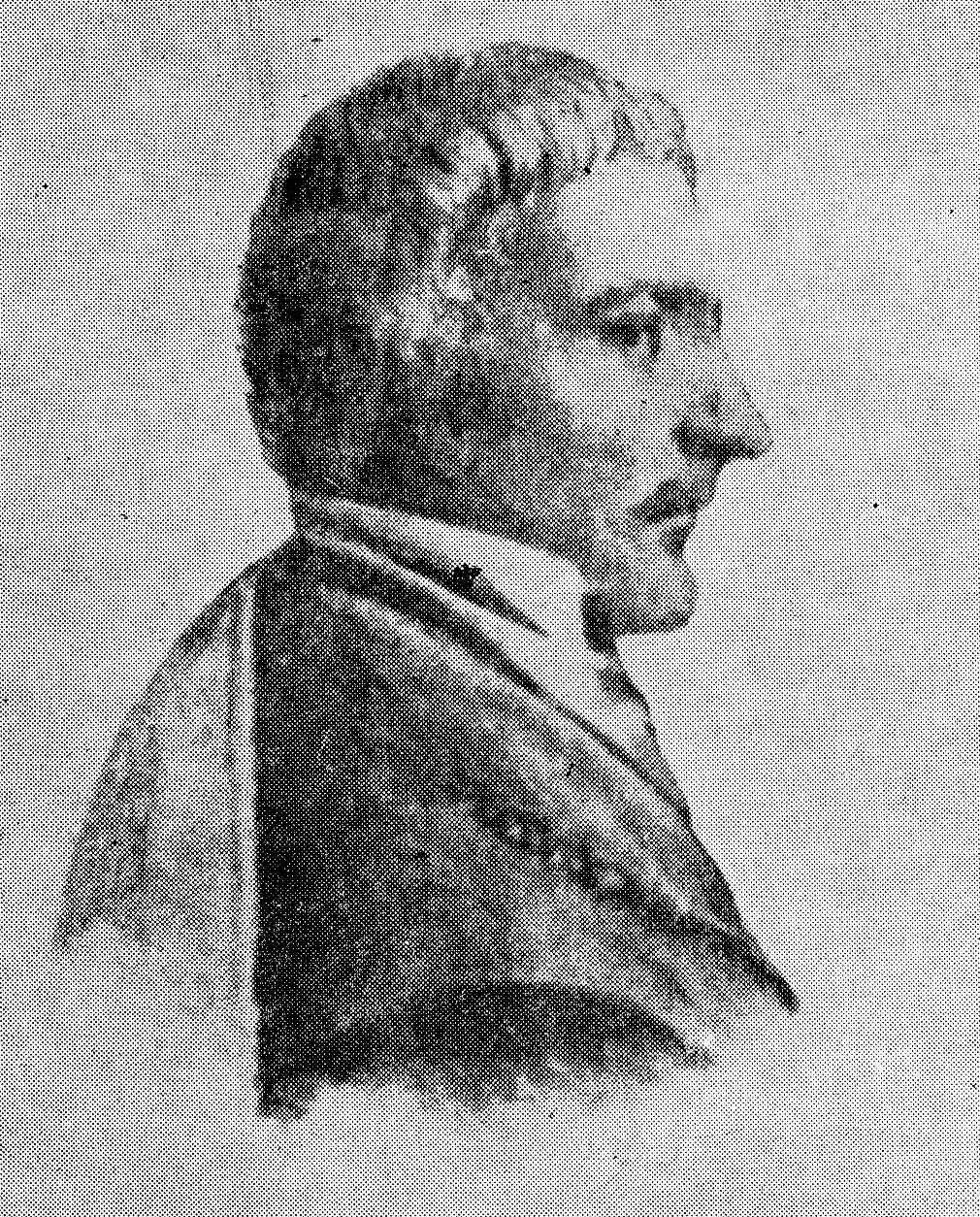 Wawrzyniec Surowiecki - polski historyk, archeolog, antropolog.